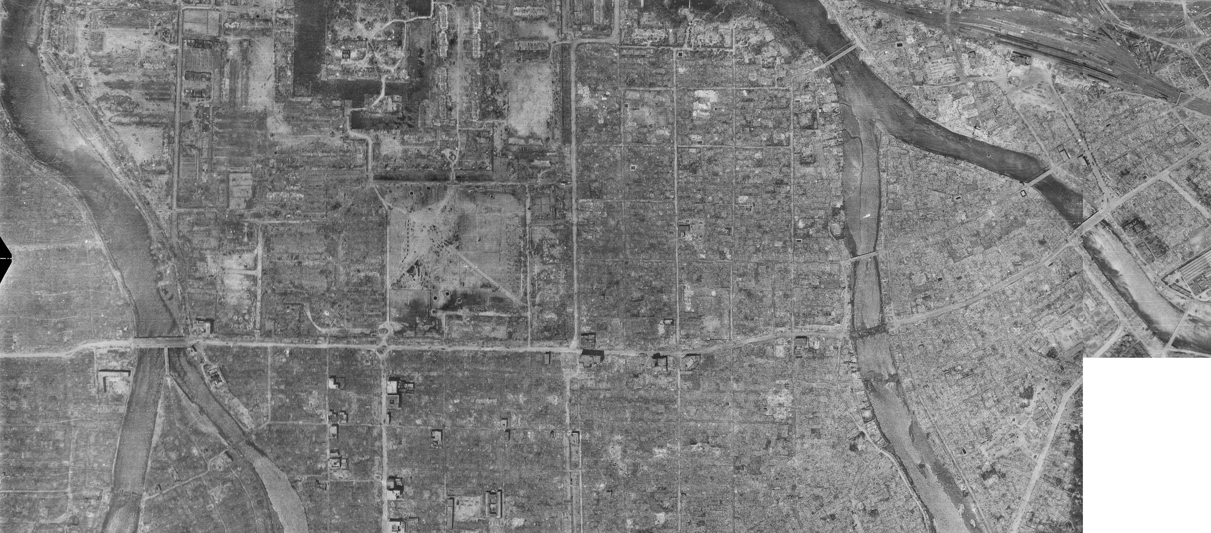 1945年8月8日広島市の相生通り周辺